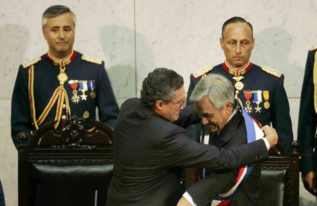 Sebastián Piñera asume como Presidente de Chile en solemne ceremonia en el Congreso Nacional